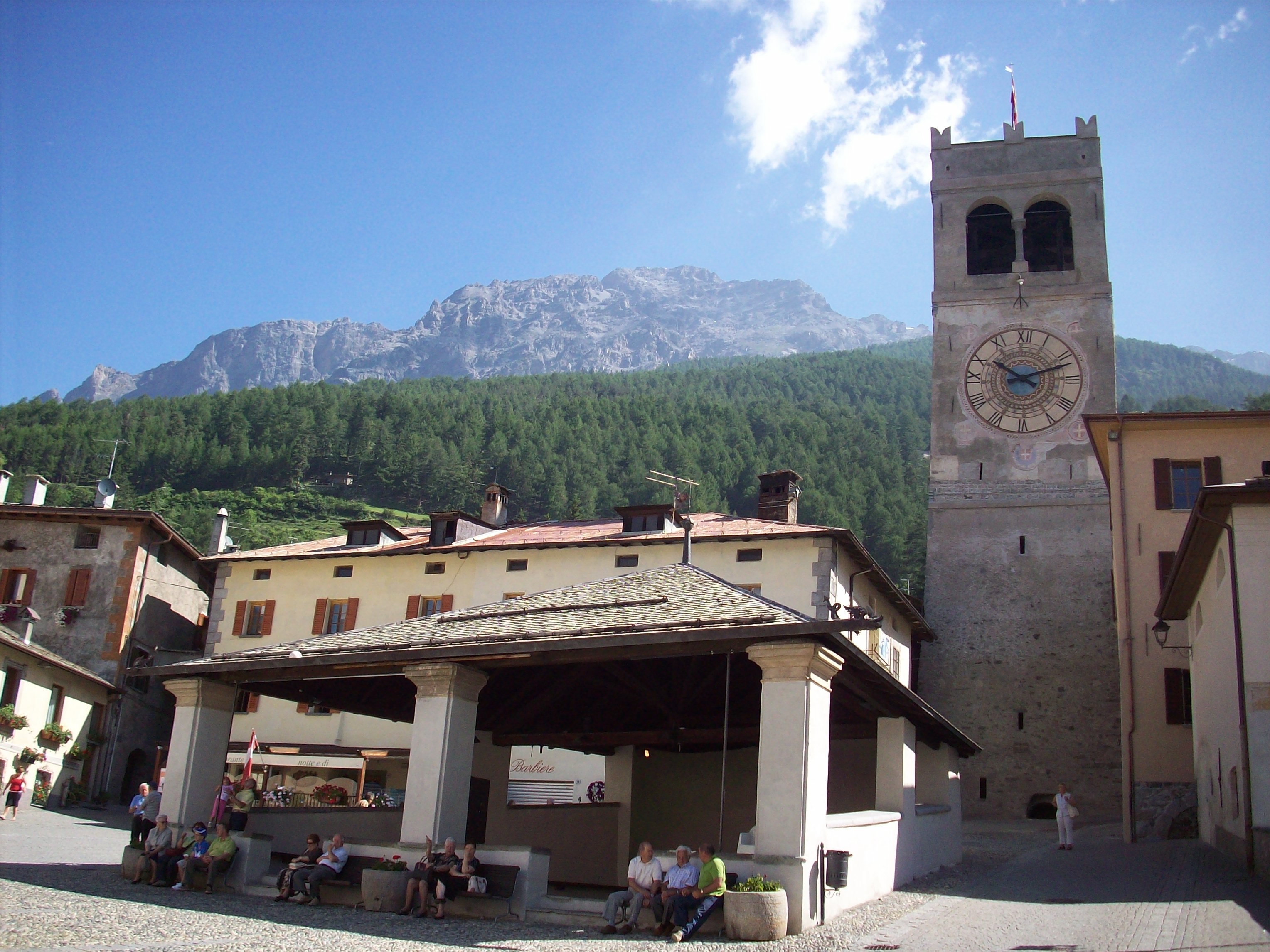 Veduta della Piazza Cavour a Bormio. Il Kuerc (o coperchio), risalente al XIV secolo, sede in cui veniva amministrata la giustizia e la Torre della Bajona.